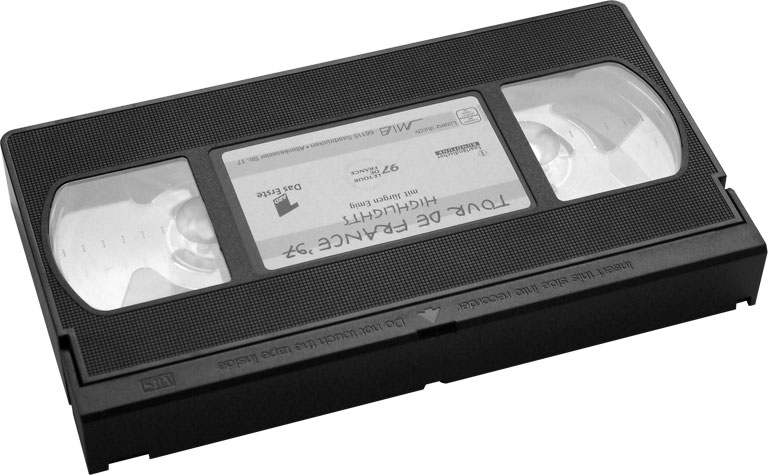 VHS-Kassette auf weissem Hintergrund